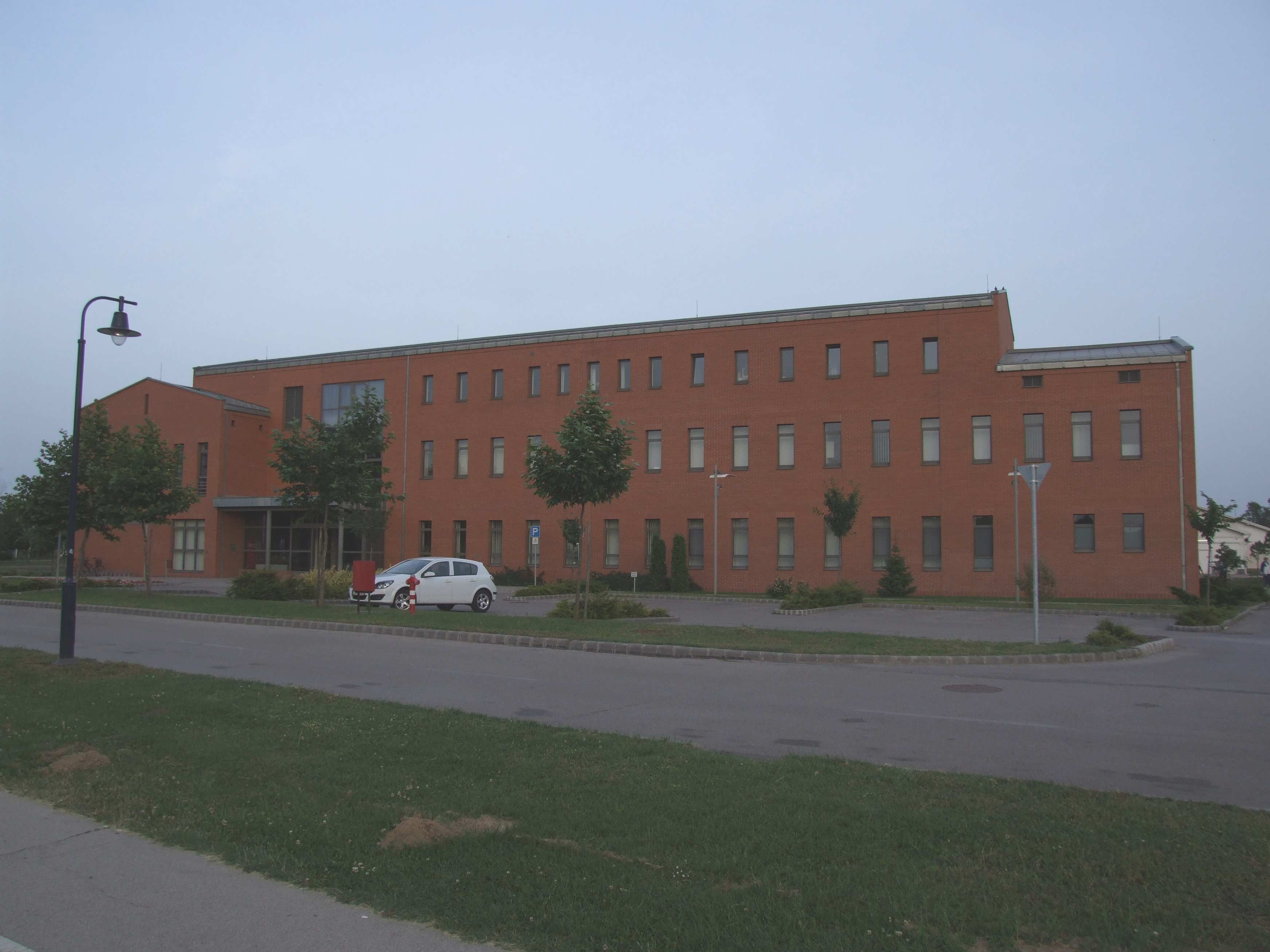 Városi szakorvosi rendelőintézet, Paks, Építész tervező: Klenk Csaba Kern és Klenk Építészeti Bt. [1]